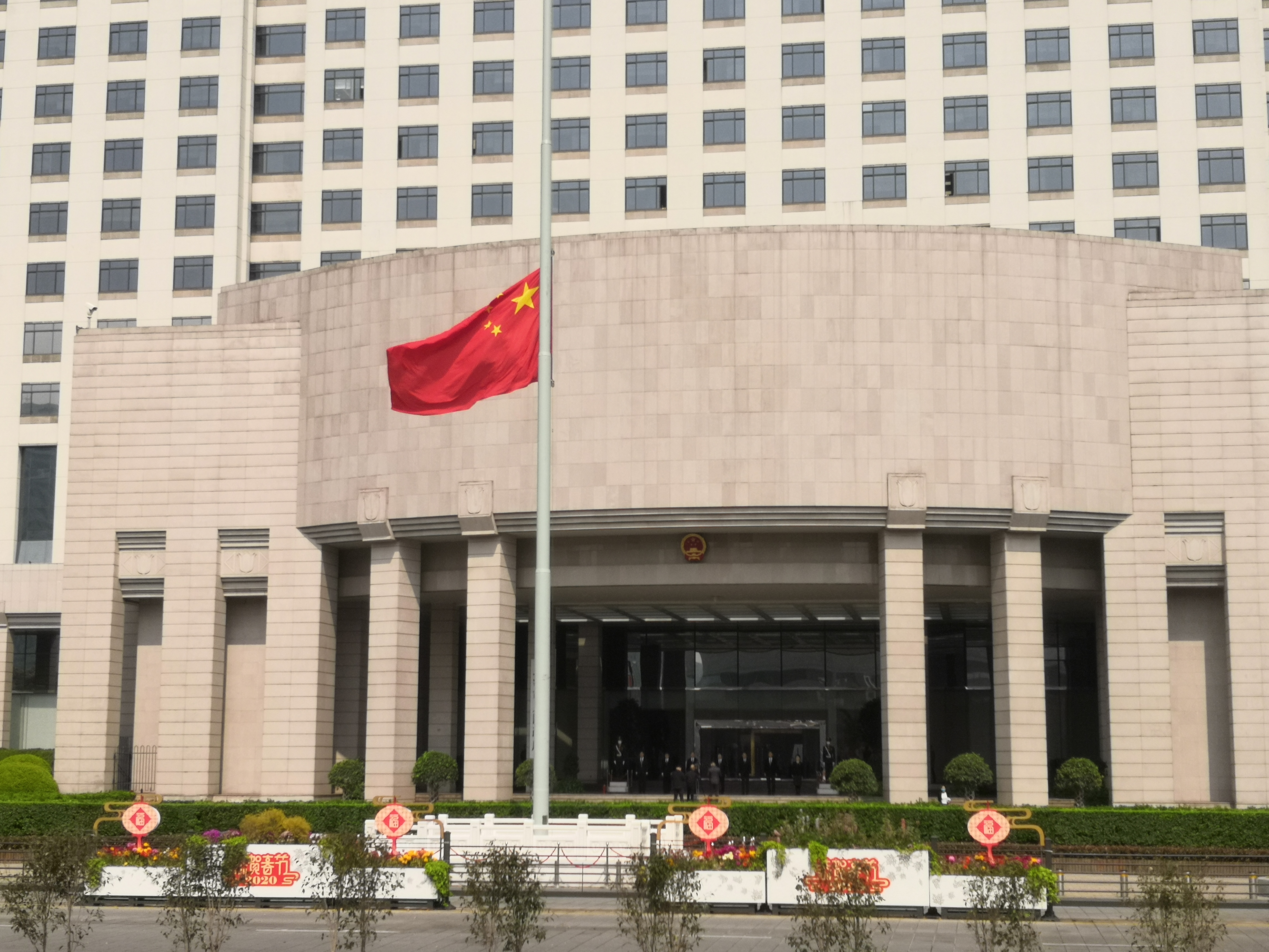 中文（中国大陆）: 2020年4月4日中国全国性哀悼活动 上海，图为上海市五套班子的领导在市政府大厦门口默哀